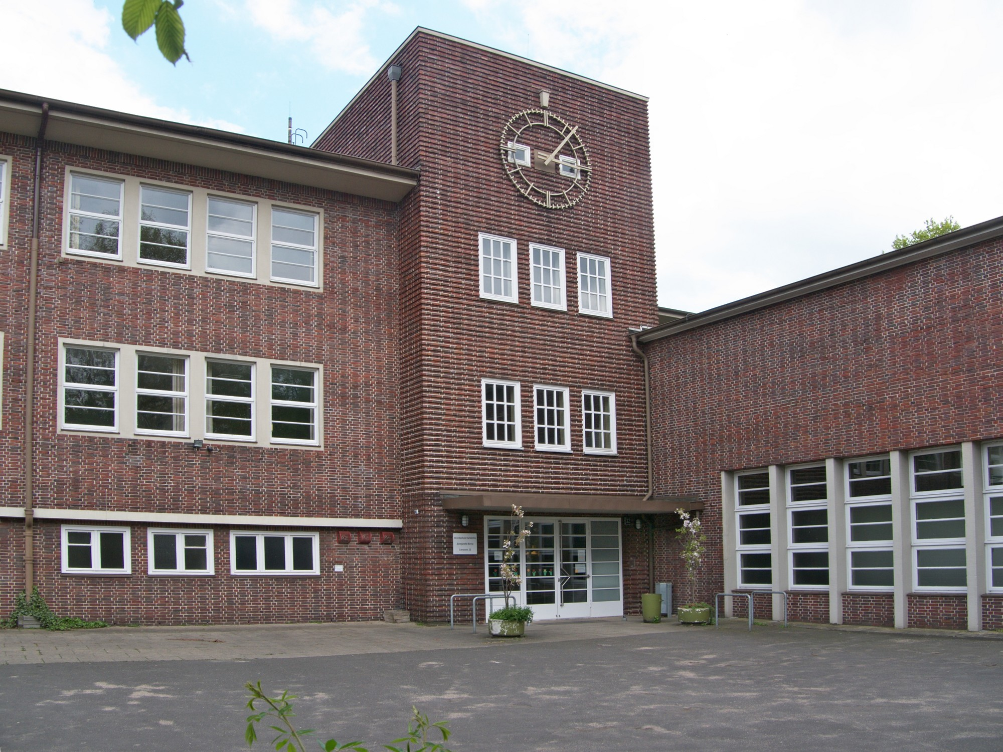 Berne Schule Lienaustraße This is a photograph of an architectural monument.